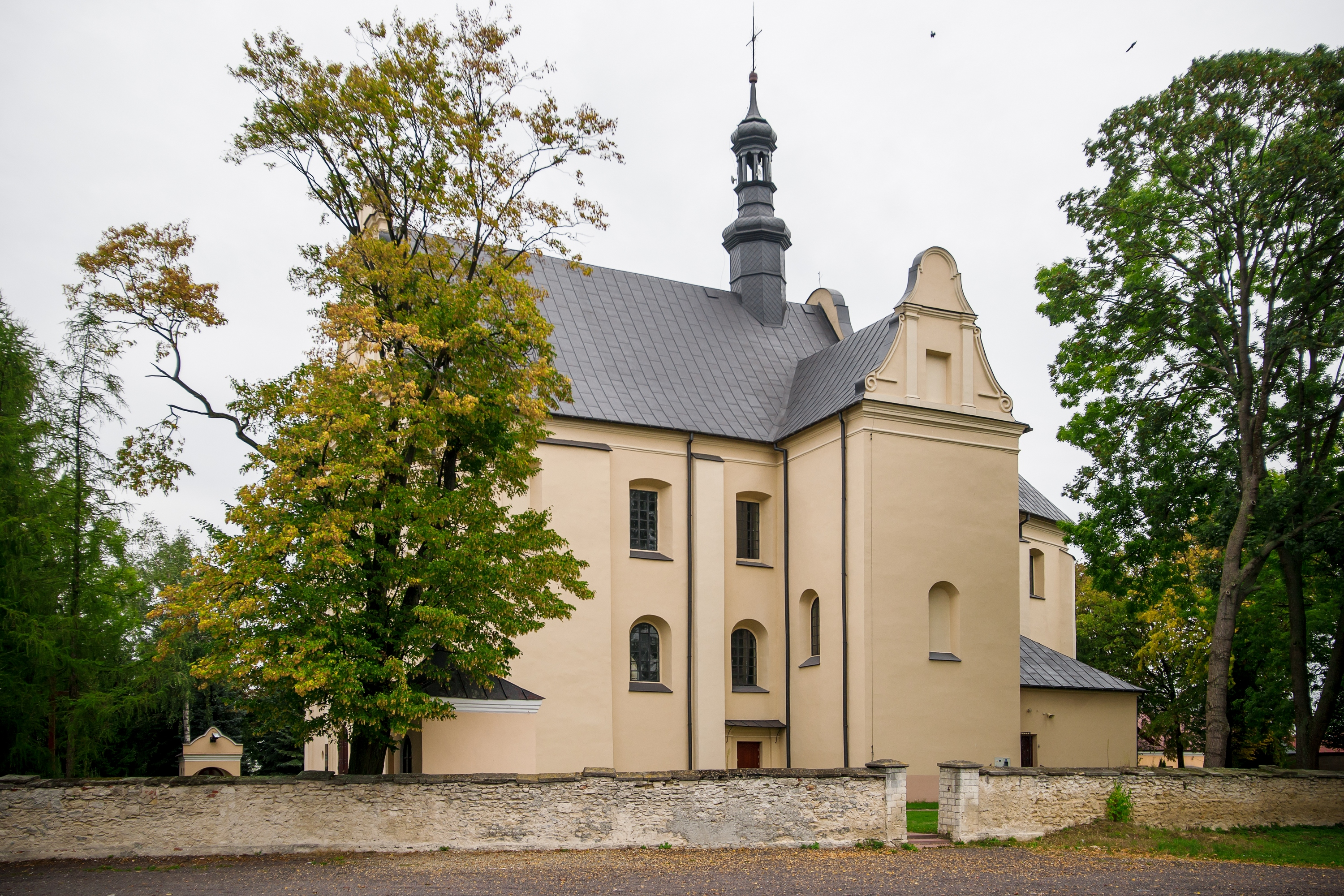 Modliborzyce, kościół par. p.w. św. Stanisława Biskupa, 1664-1668, XVIII